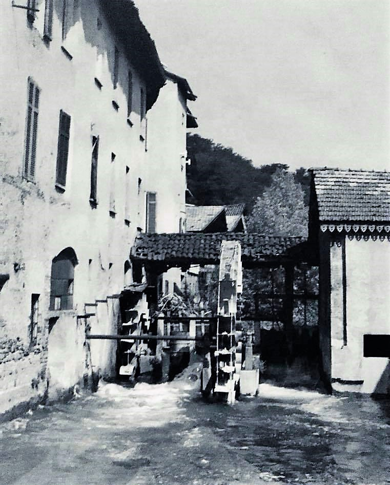 Il molino del sasso a Olgiate Olona in una foto degli anni 1960.